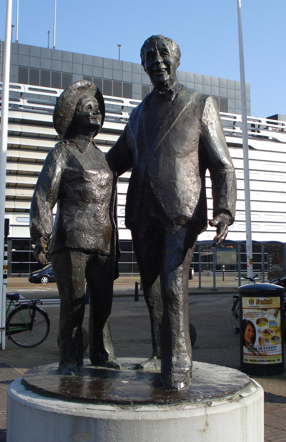 Den Haag, Gevers Deynootplein. Kunstwerk "Wim Kan en Corry Vonk" van Siemen Bolhuis. The Hague/The Netherlands.